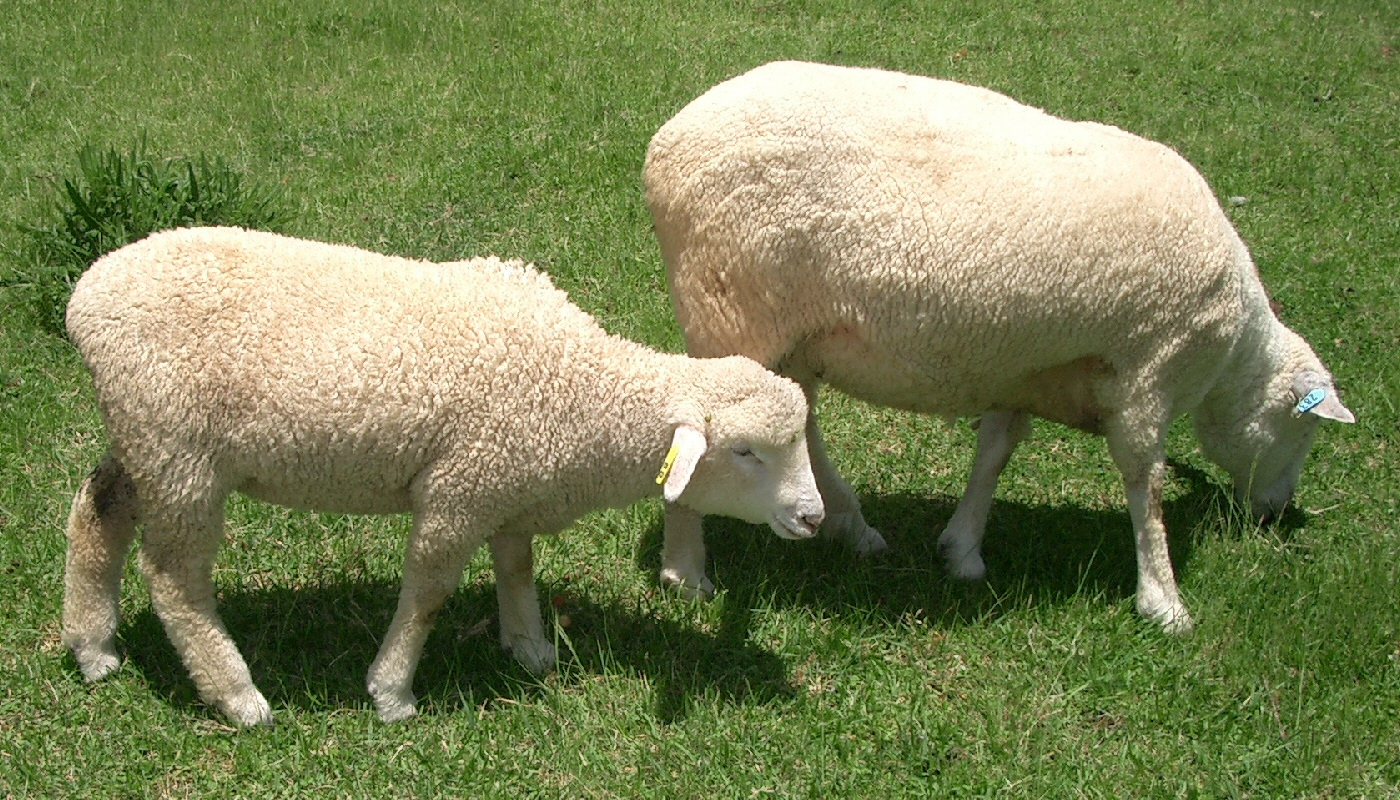 Sheep taken in Rokko Farm, Kobe, Japan. 羊（2004/6/13 六甲山牧場にて撮影）